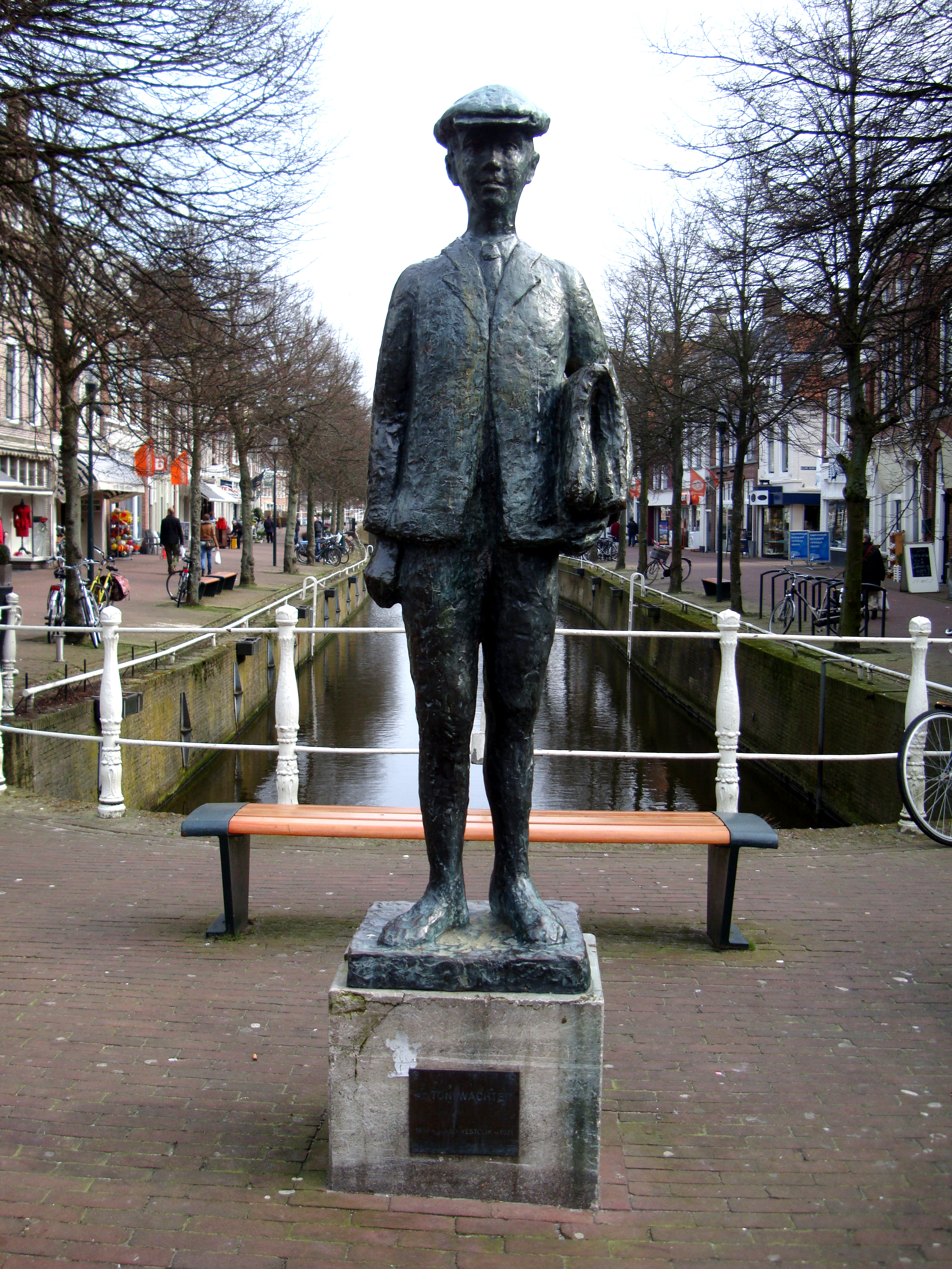 Harlingen - Anton Wachter een romanfiguur uit de boeken van Simon Vestdijk